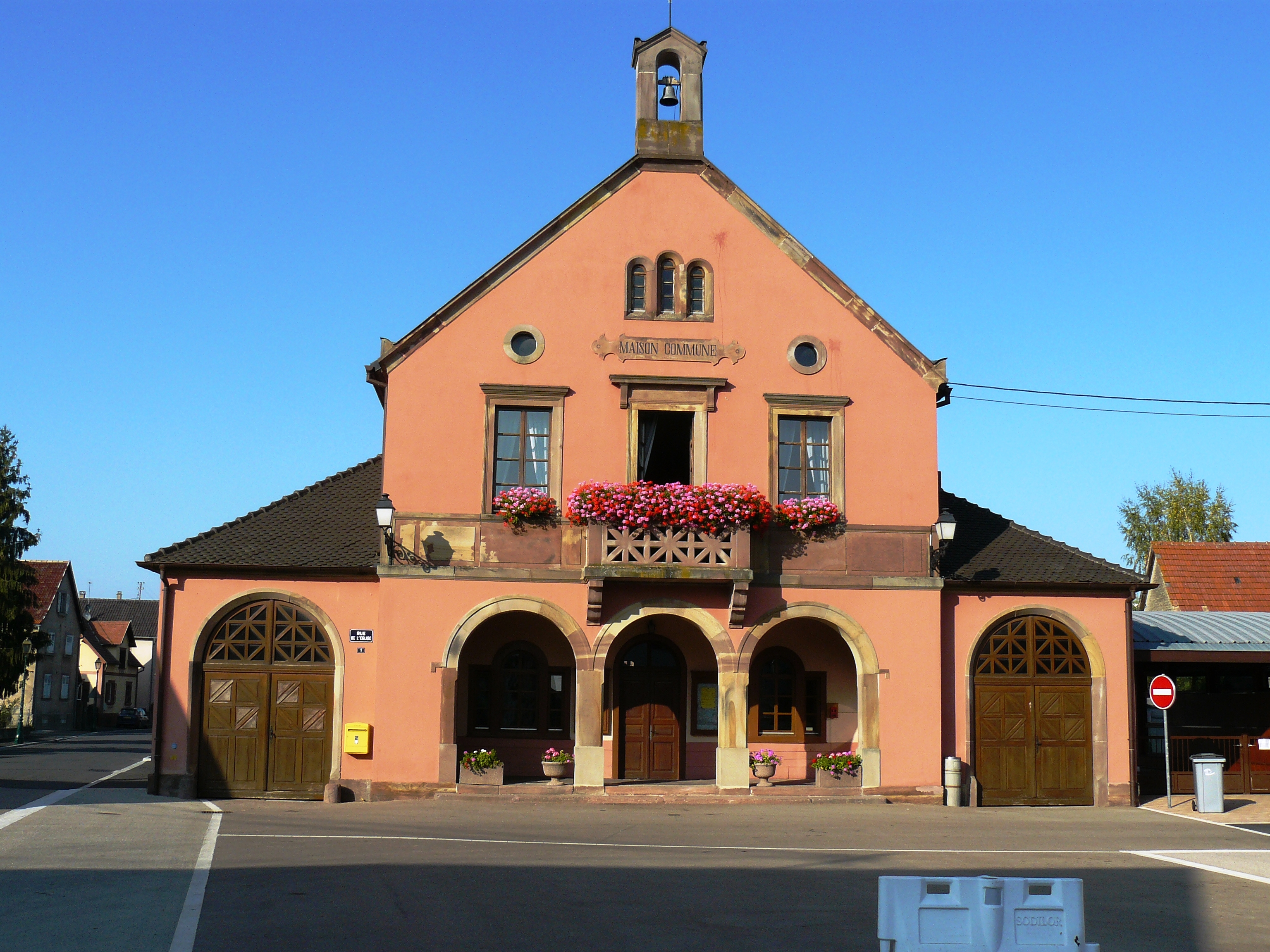 La maison commune du village